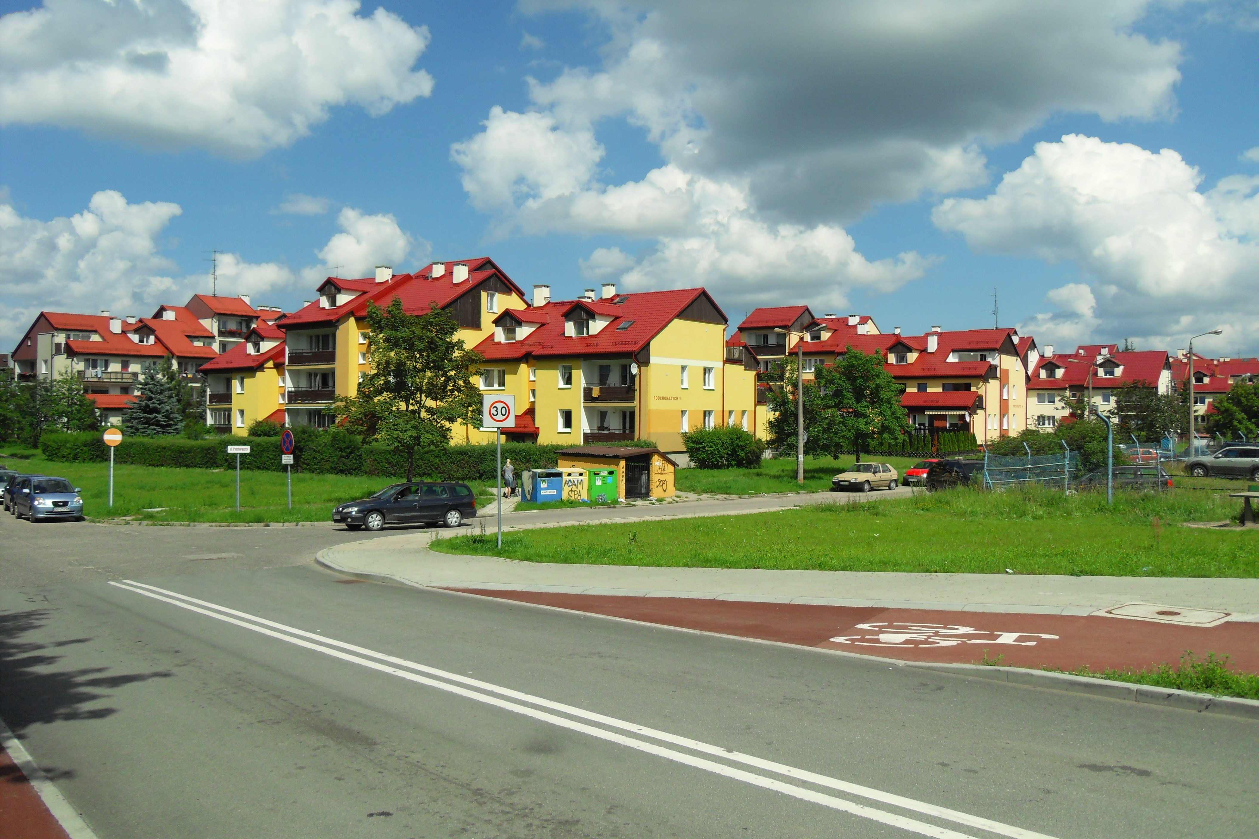 Gdańsk Matarnia, dawne osiedle "40-lecia PRLu".